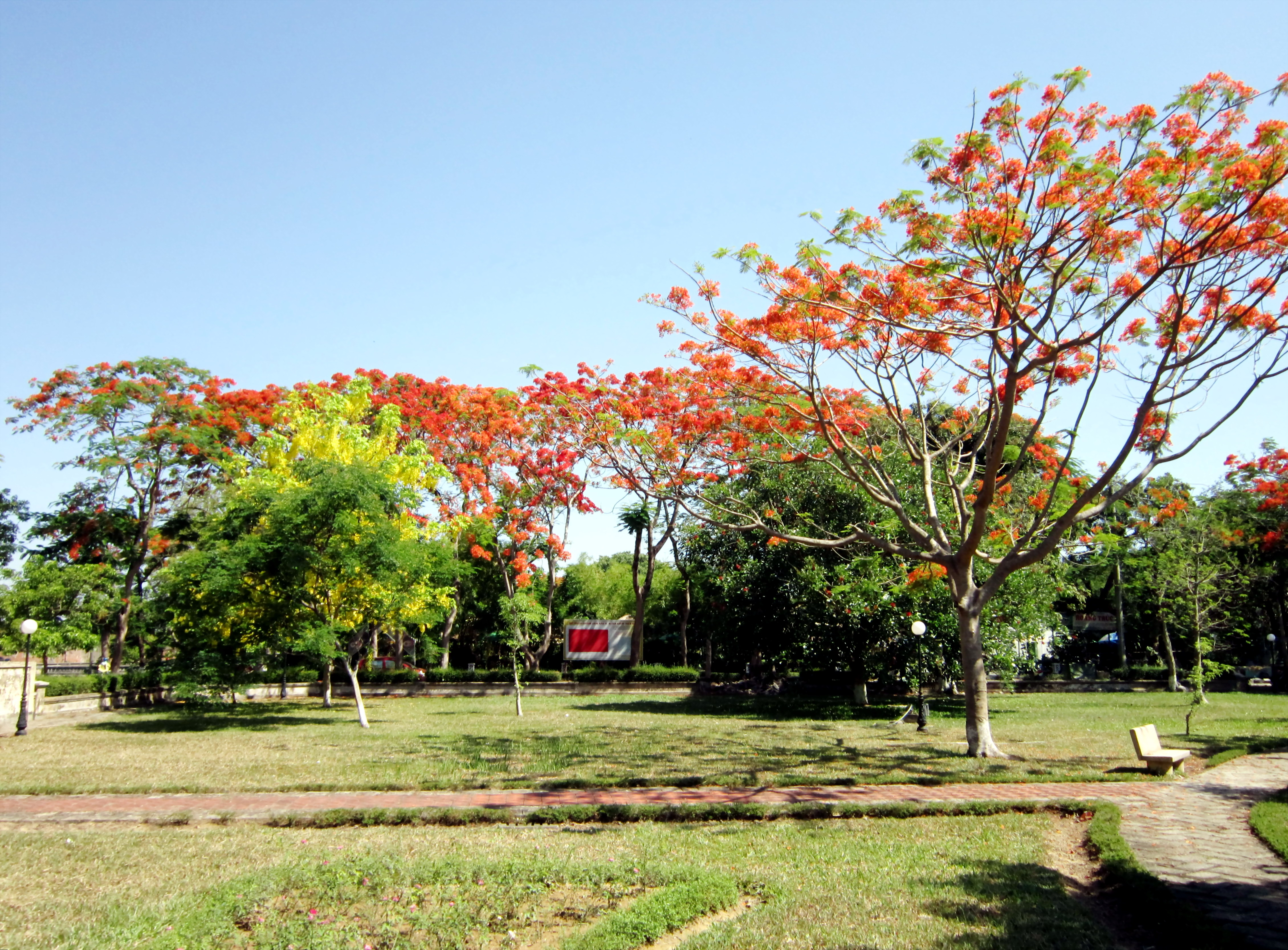 Công viên Nguyễn Văn Trỗi nằm trên đường Đoàn Thị Điểm, TP. Huế, Việt Nam. Khi xưa phủ Tôn Nhơn của nhà Nguyễn đặt ở đây.